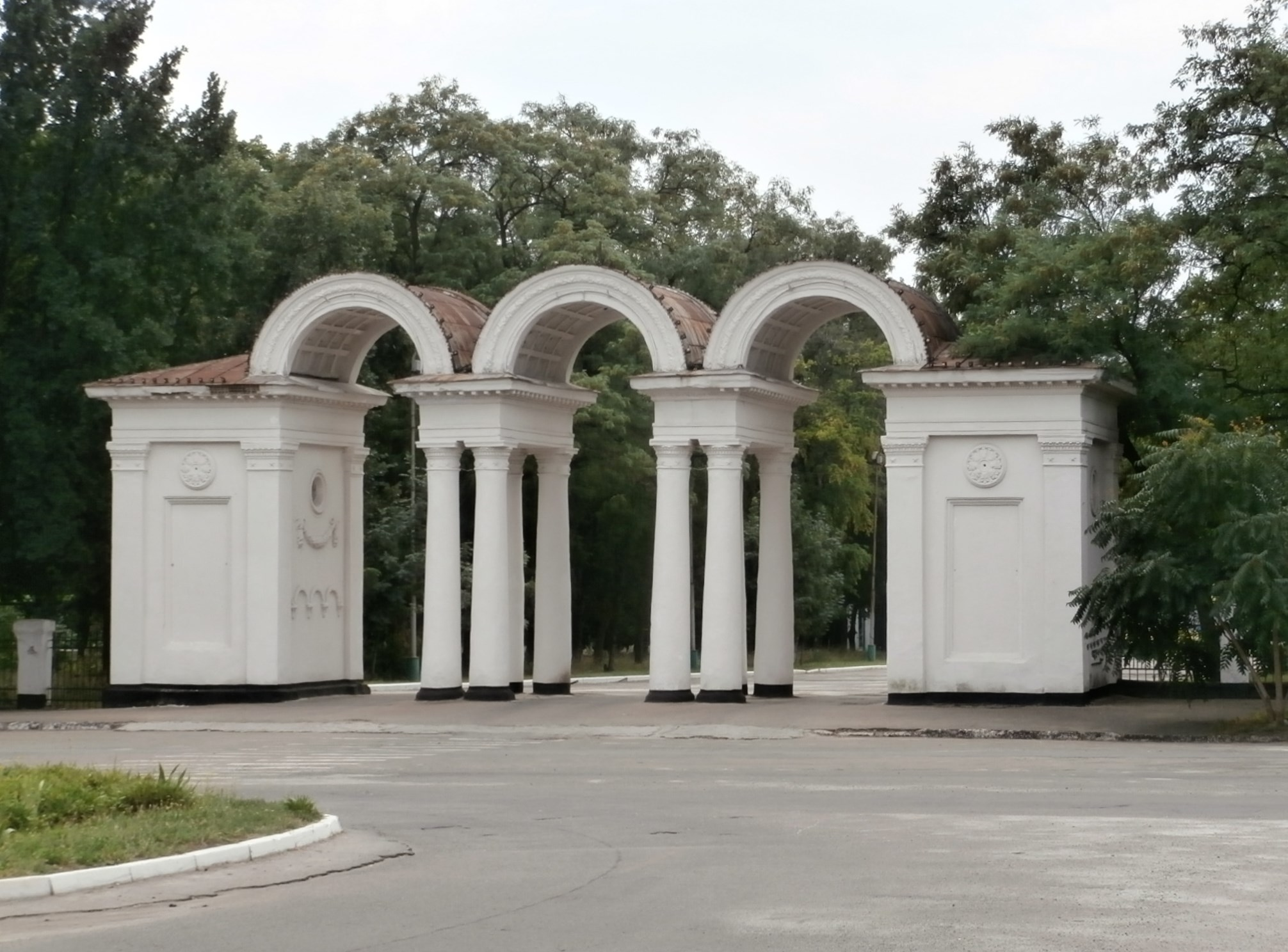 Avangard-Stadion in Schowti Wody Eingang